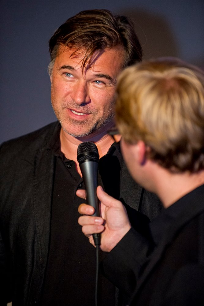 Daniel Lambo